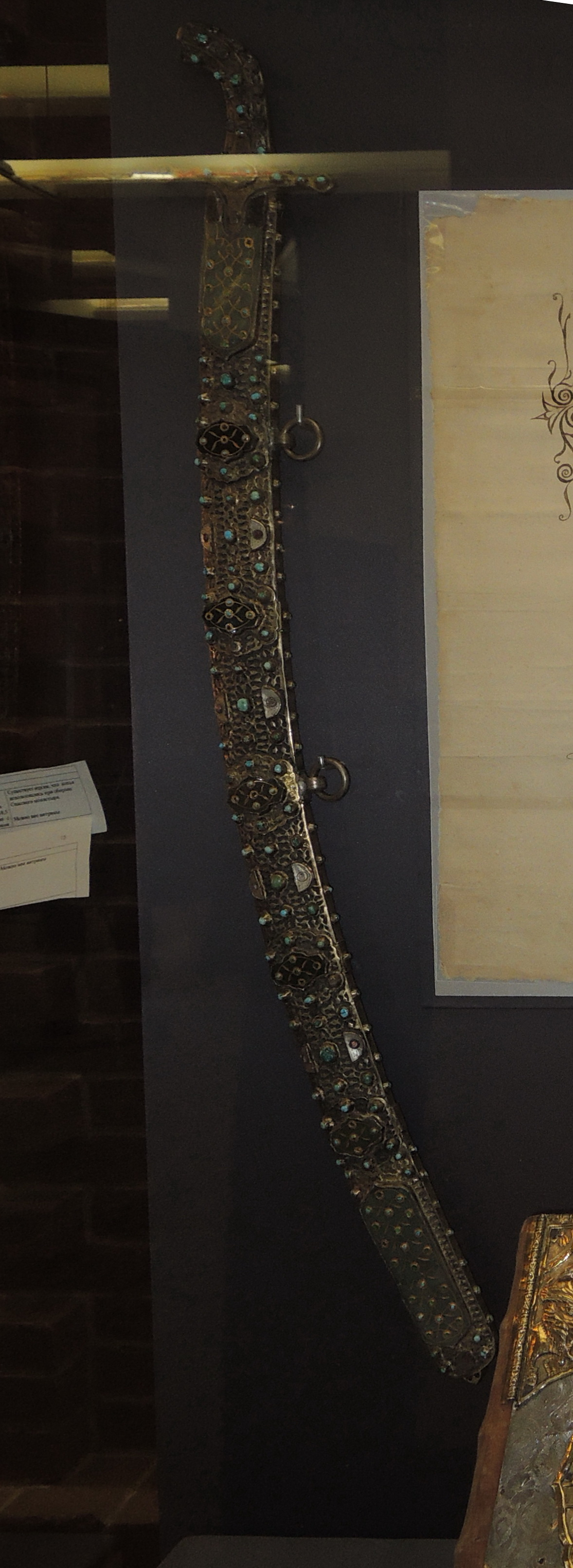 Сабля в ножнах. Россия, Турция (?). 1-я пол. 17 века. Серебро, позолота, камни, дерево, сталь; ковка, резьба, басма. ГИМ. Принадлежала князю Дм. М. Пожарскому